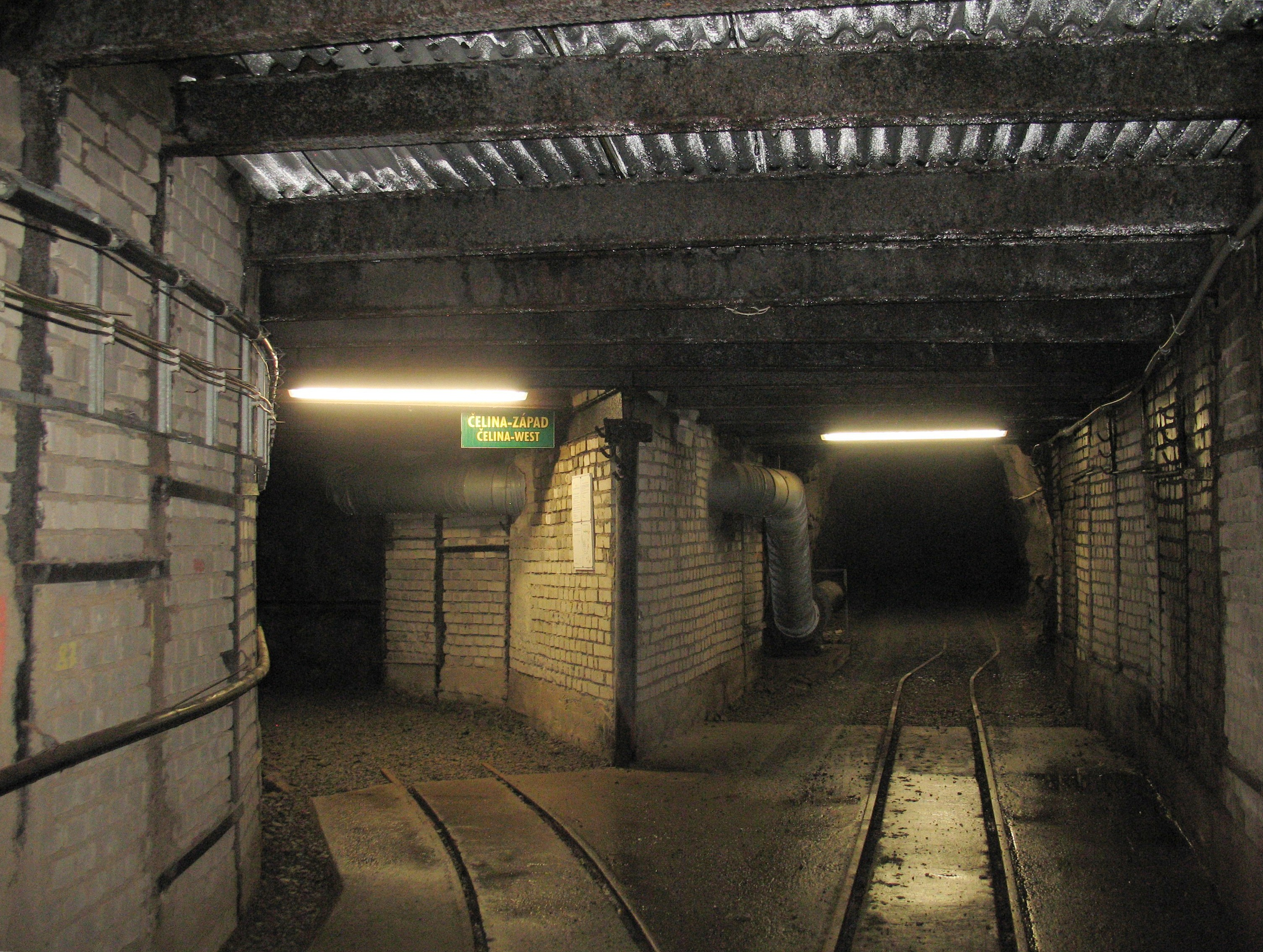 Rozcestí páteřní štoly a chodby, která vede k levé části ložiska Čelina